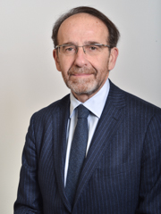 Senatore Riccardo Nencini